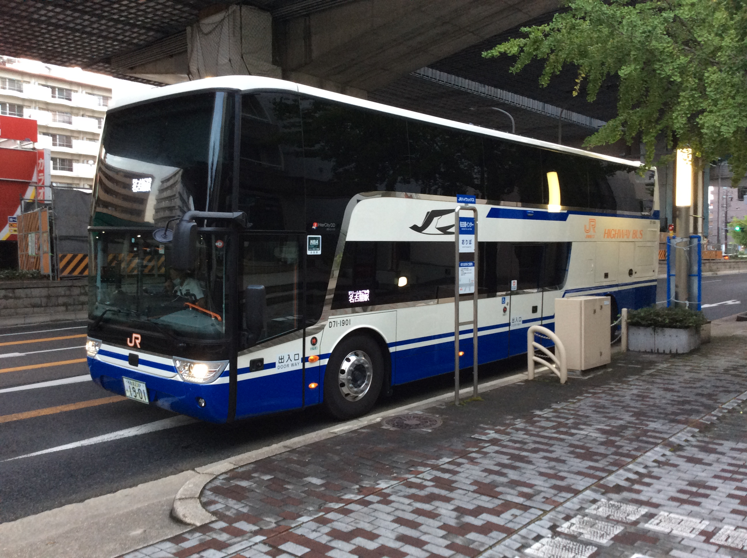 ドリームなごや号で運用中のInterCityDD。名古屋市名東区上社の名古屋インターバス停（降車専用）にて。